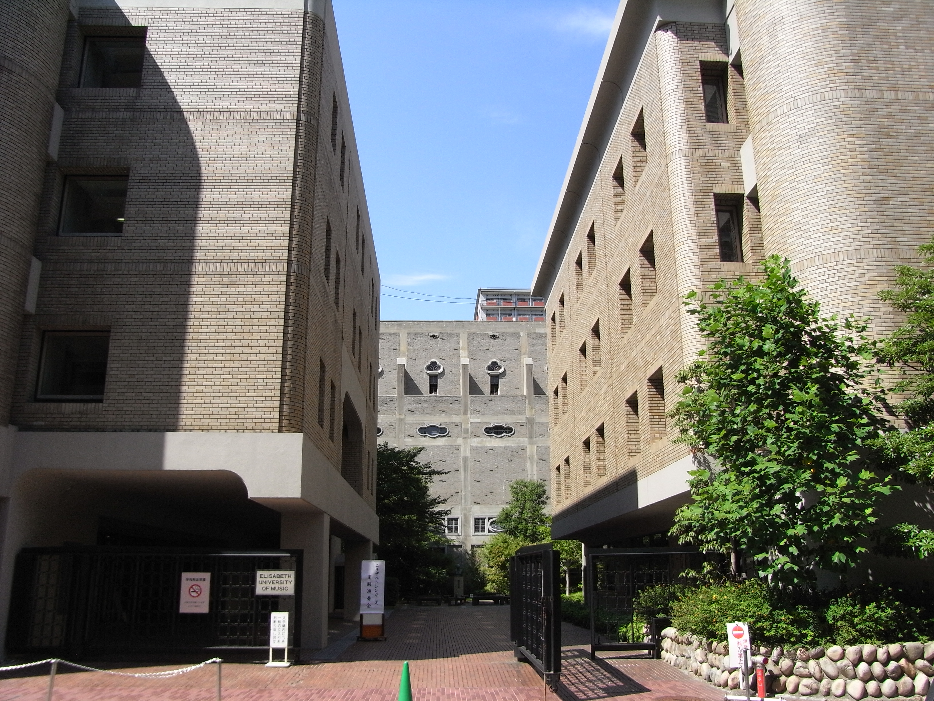 2008年07月27日本人撮影 エリザベト音楽大学